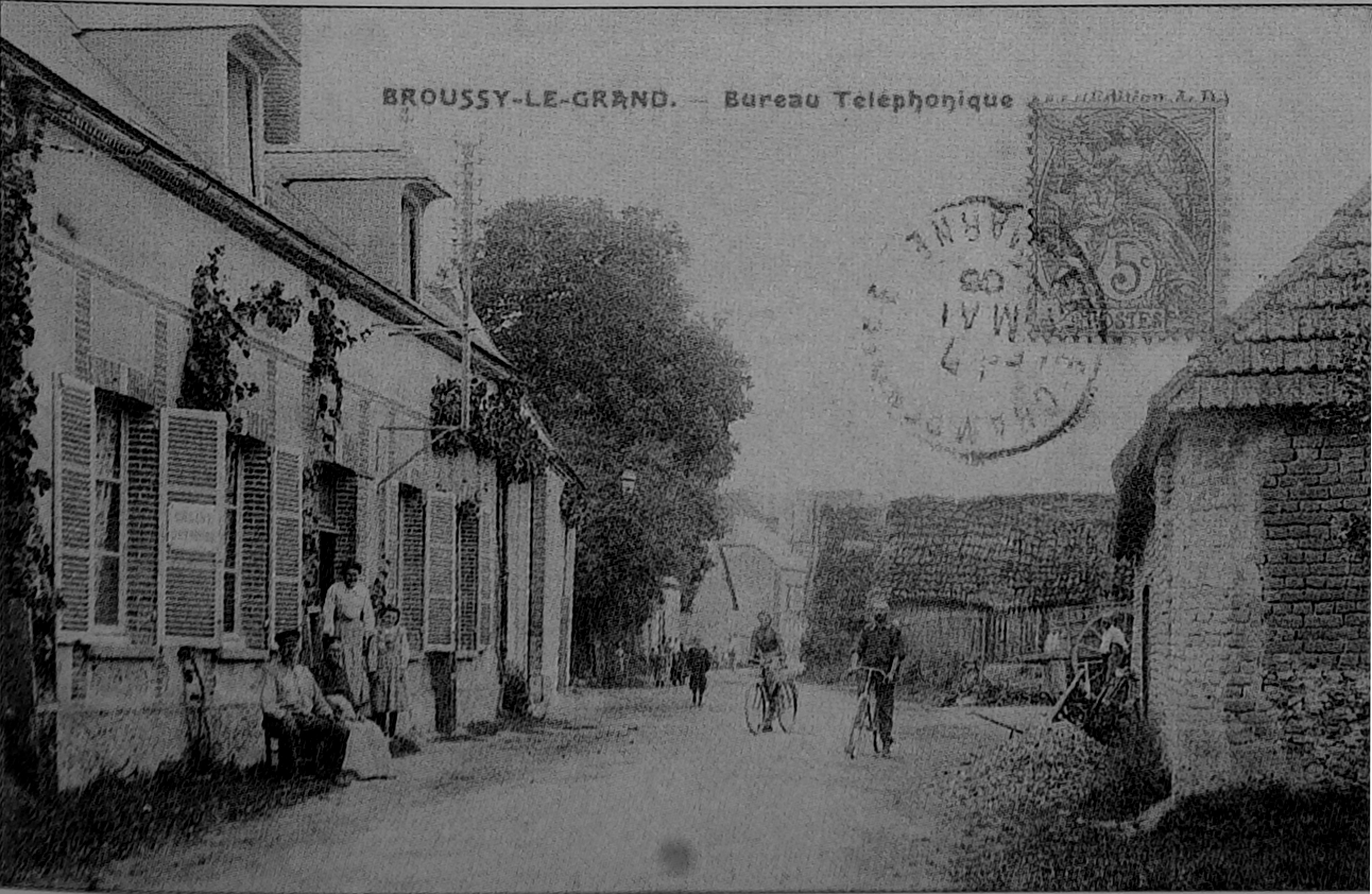 vue ancienne.